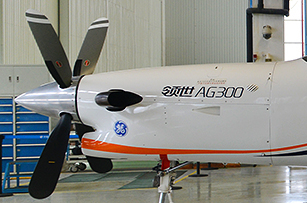 AVIC AG300 Reg.: B-00NC MSN: 001